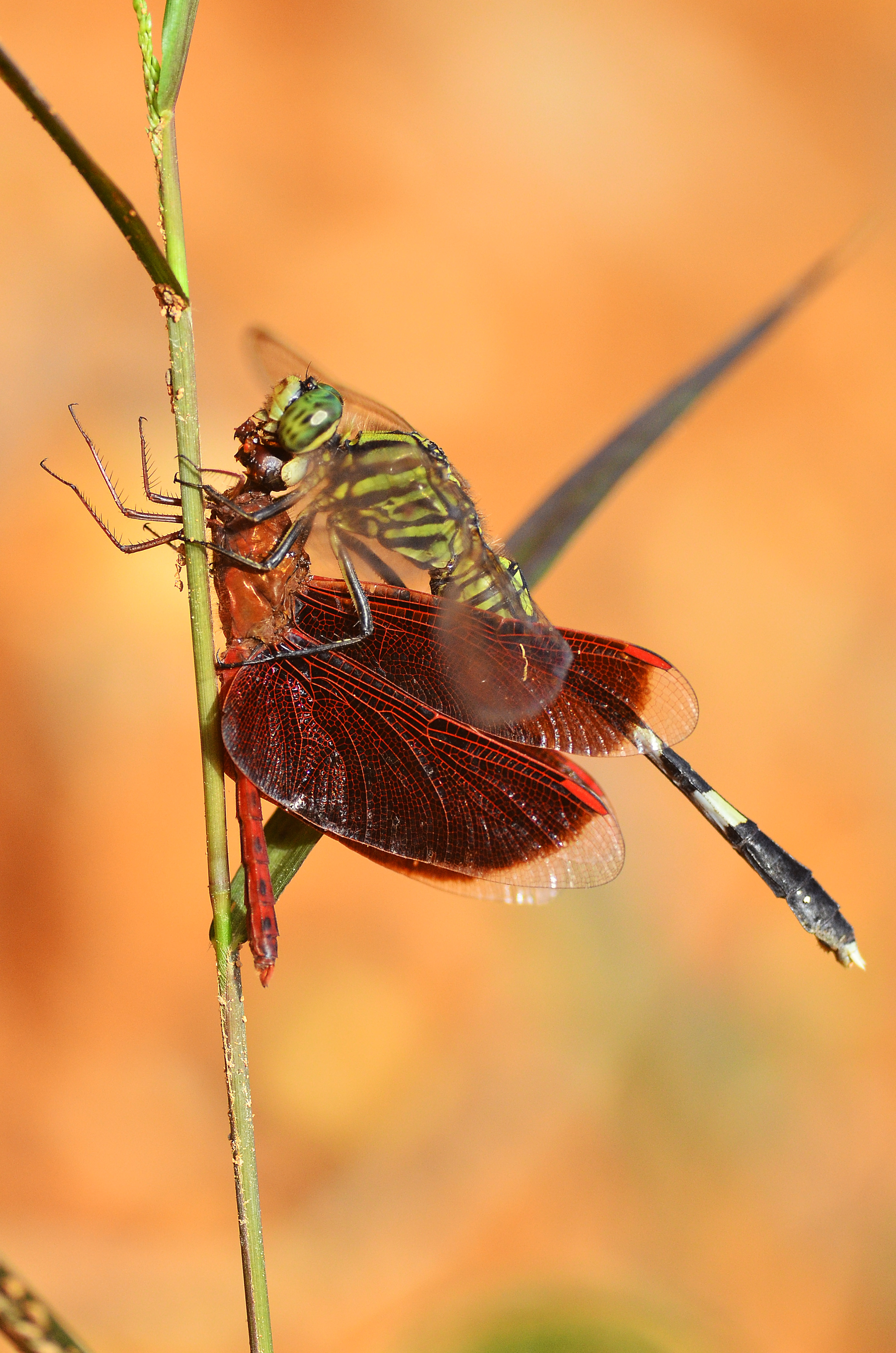 Seekor capung dari jenis Orthetrum Sabina sedang memangsa capung lainnya dari jenis Neurothemis sp.